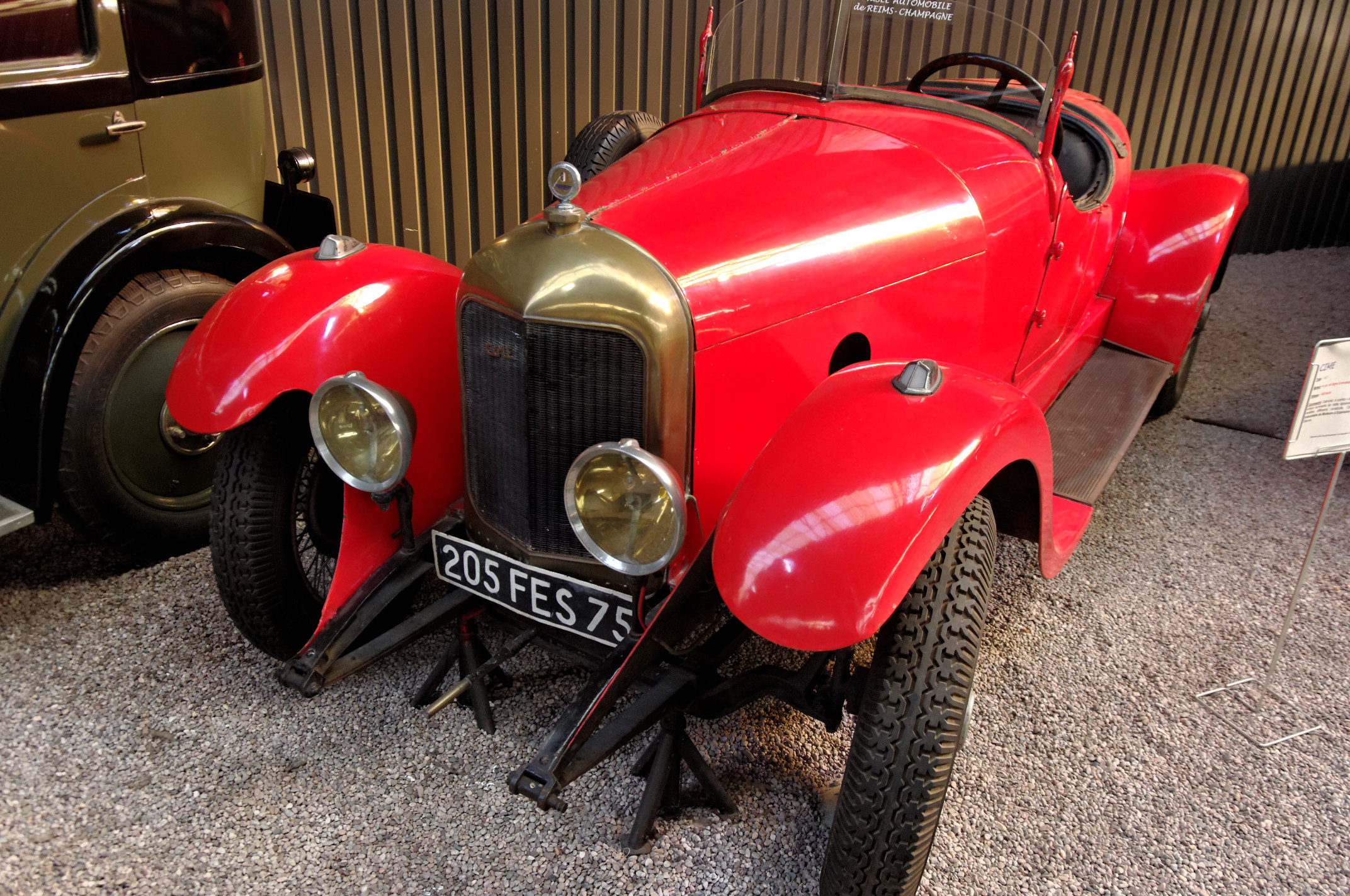 CIME A 2 (1929), Cabriolet, 4 cyl. en ligne, soupapes en tête, 1203 cm3, 35 ch., vitesse max. 105 km/h(Musée Automobile Reims Champagne, Reims, Marne, France)